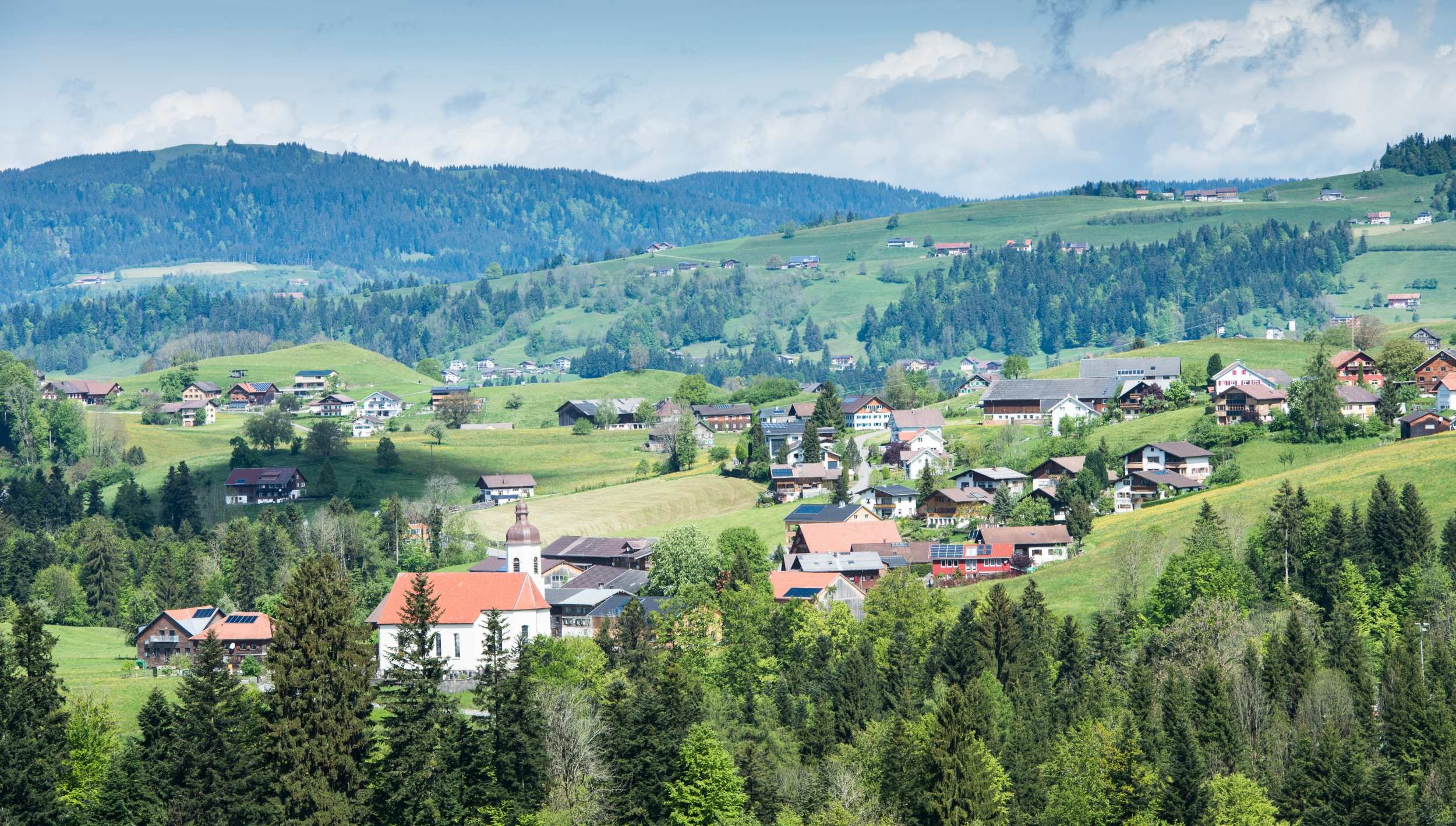 Langenegg im Bregenzerwald